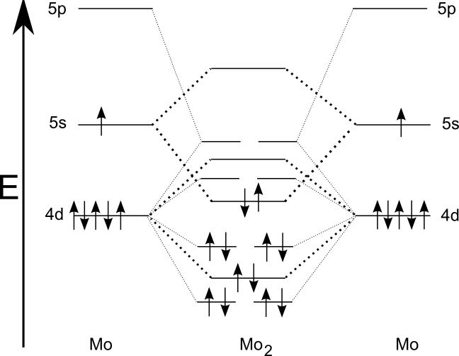 Molybdenum MO diagram